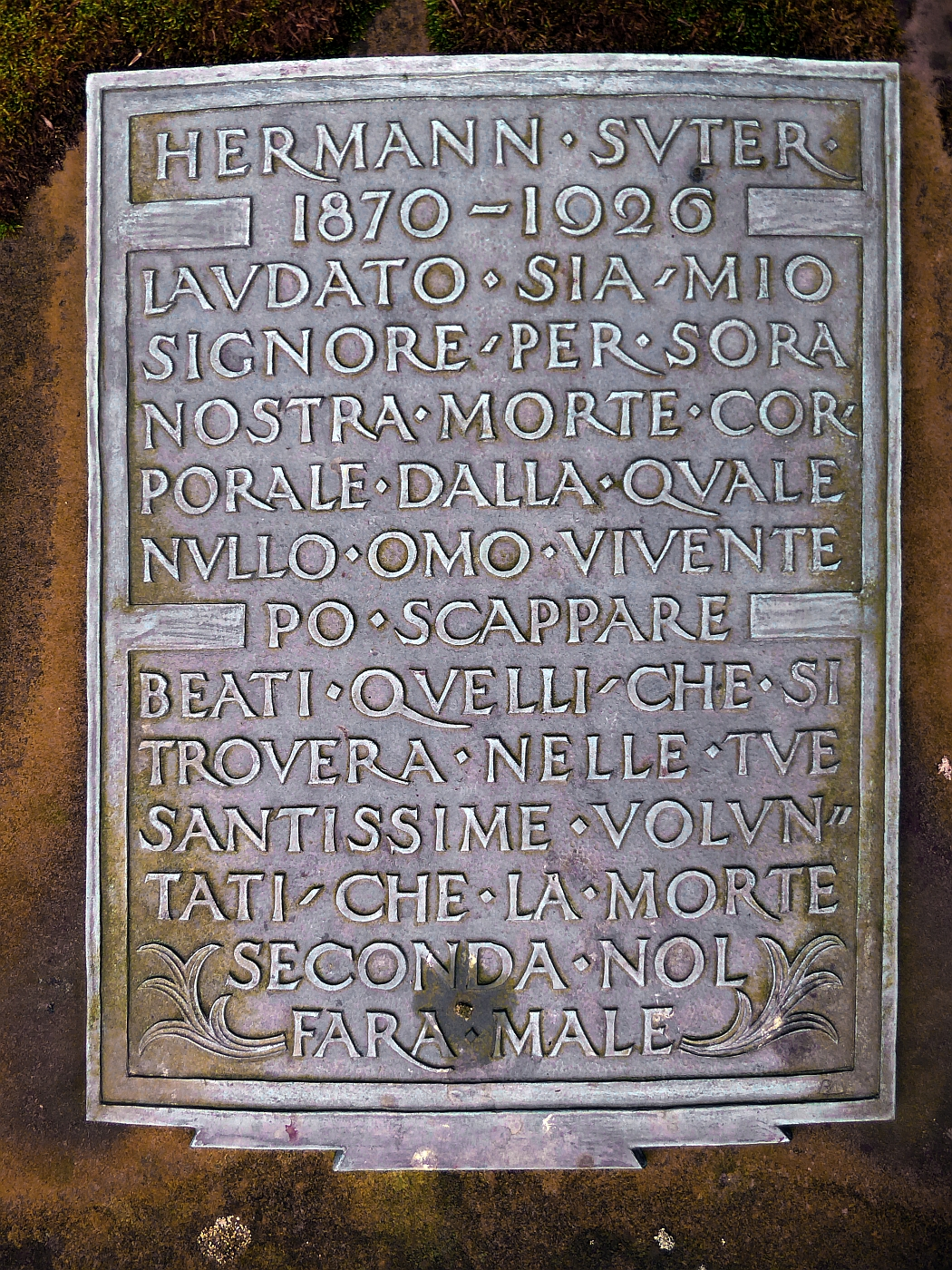 Hermann Suter- Buechi (1870–1926), Organist, Musiklehrer, Dirigent, Komponist, Direktor des Konservatoriums Basel, Grab auf dem Friedhof Hörnli, Riehen, Basel-Stadt